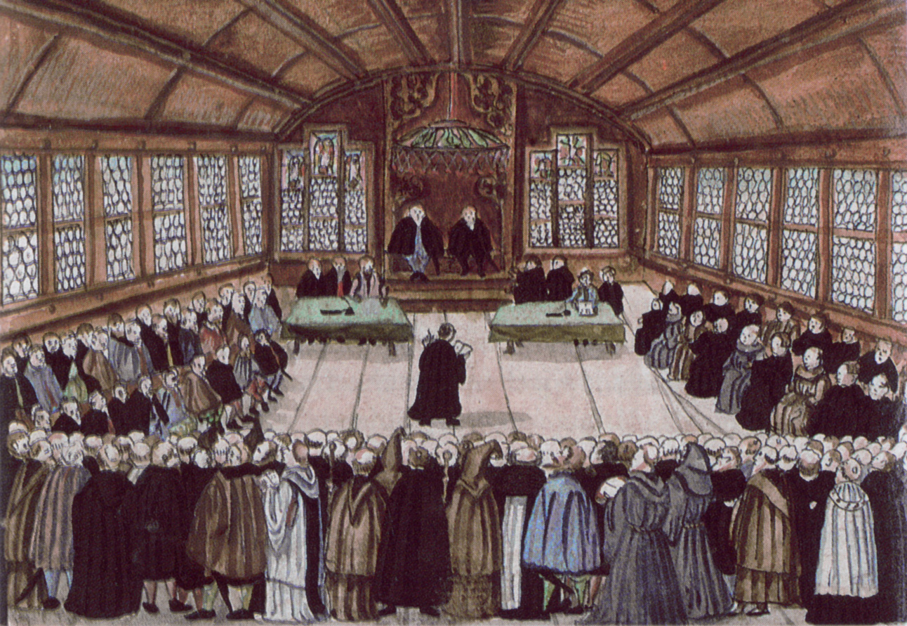 Darstellung der ersten Zürcher Disputation von 1523 in einer Abschrift von Bullingers Reformationsgeschichte